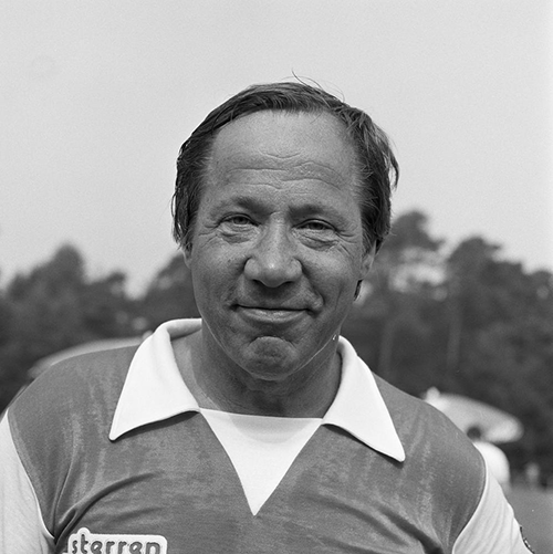 Piet Römer in AVRO's Sterrenslag